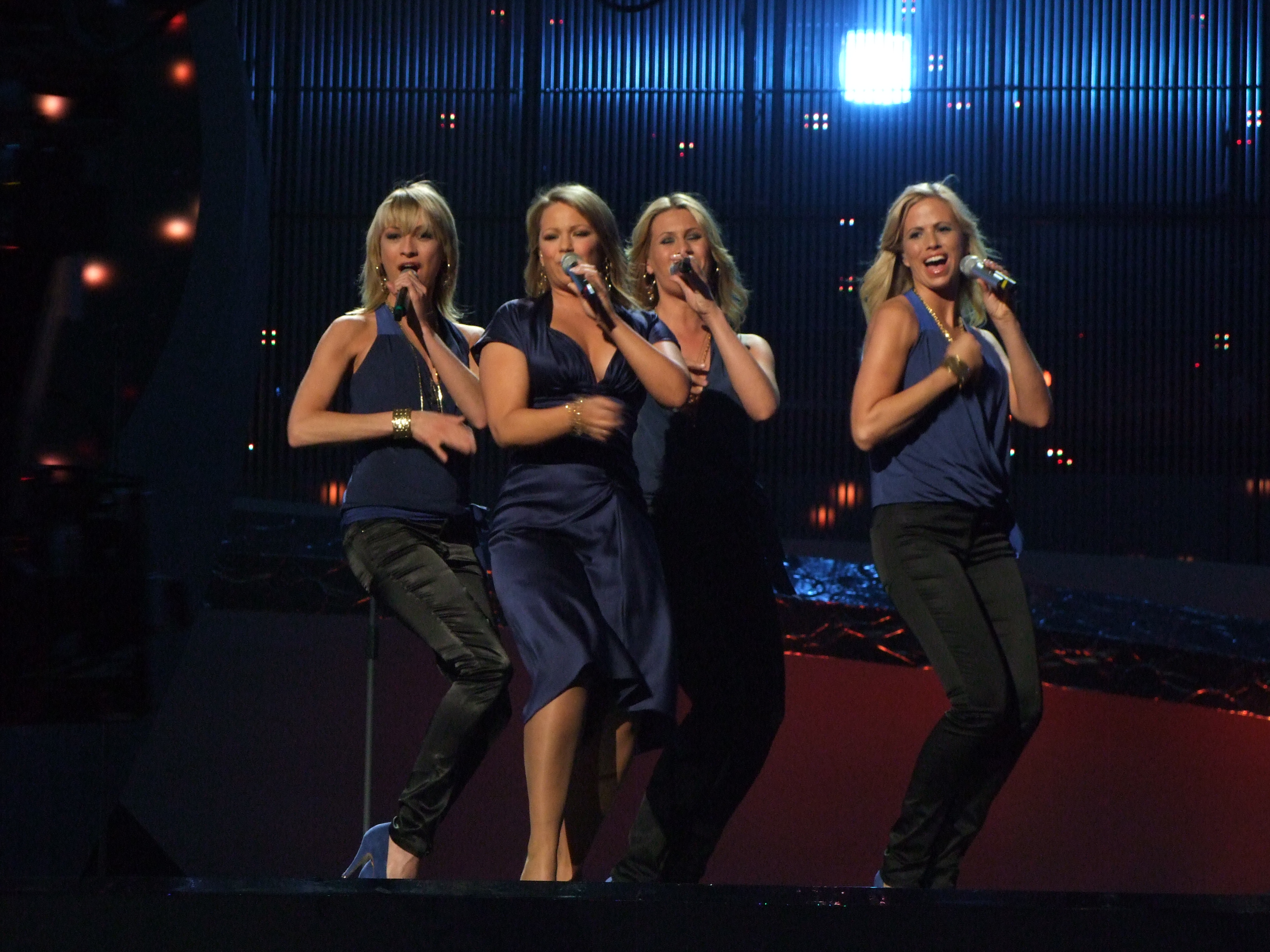 Semifinal 1 EUROVISION 2008